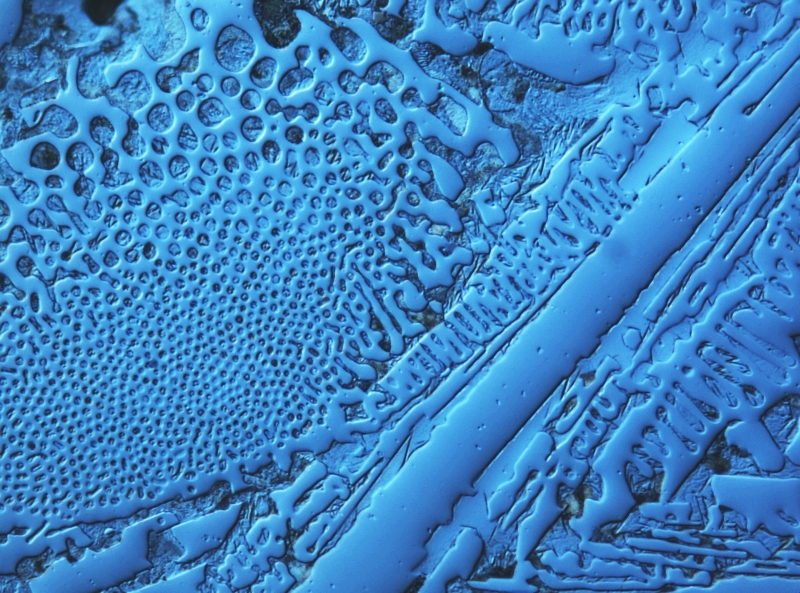 Hartguss